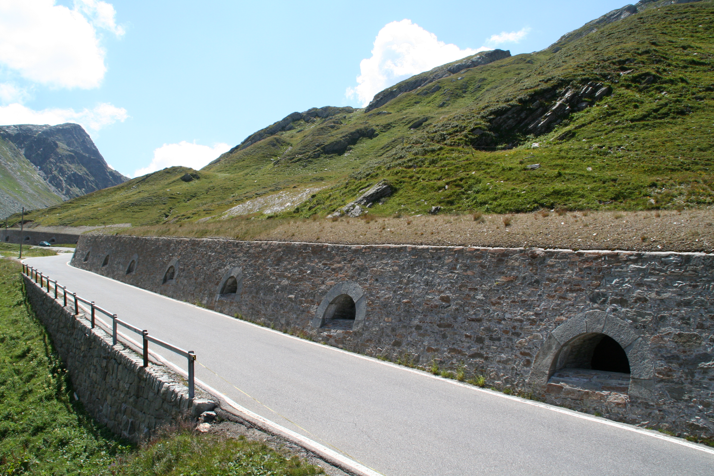 Splügengalerie bergwärts